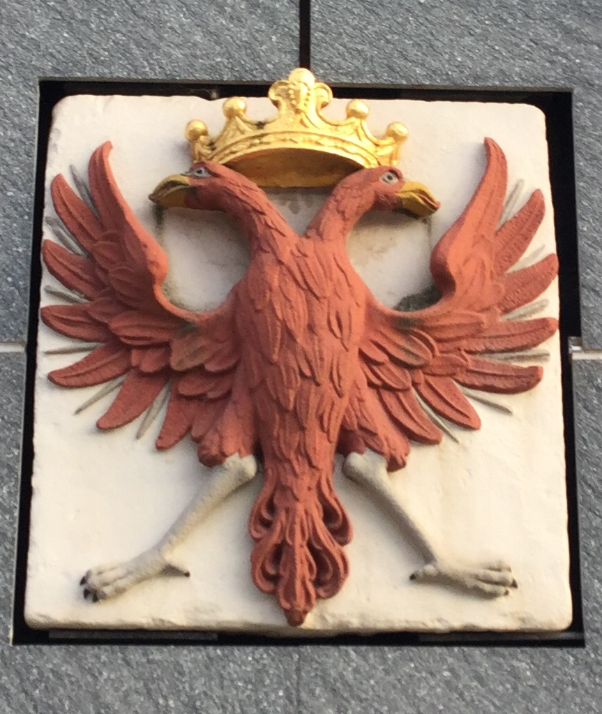 Wappentafel am Haus Breiter Weg 27-30 in Magdeburg